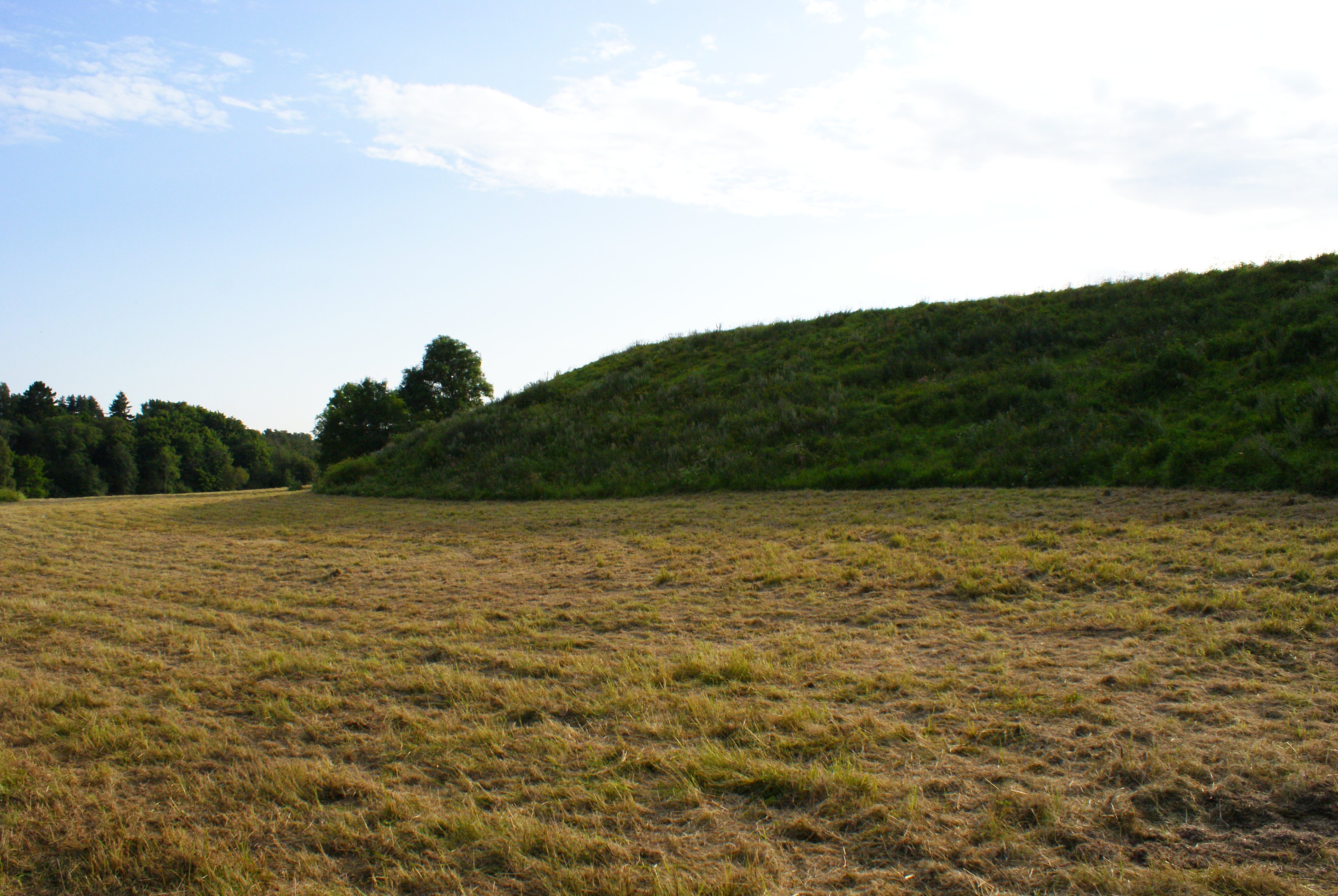 Iru linnamägi